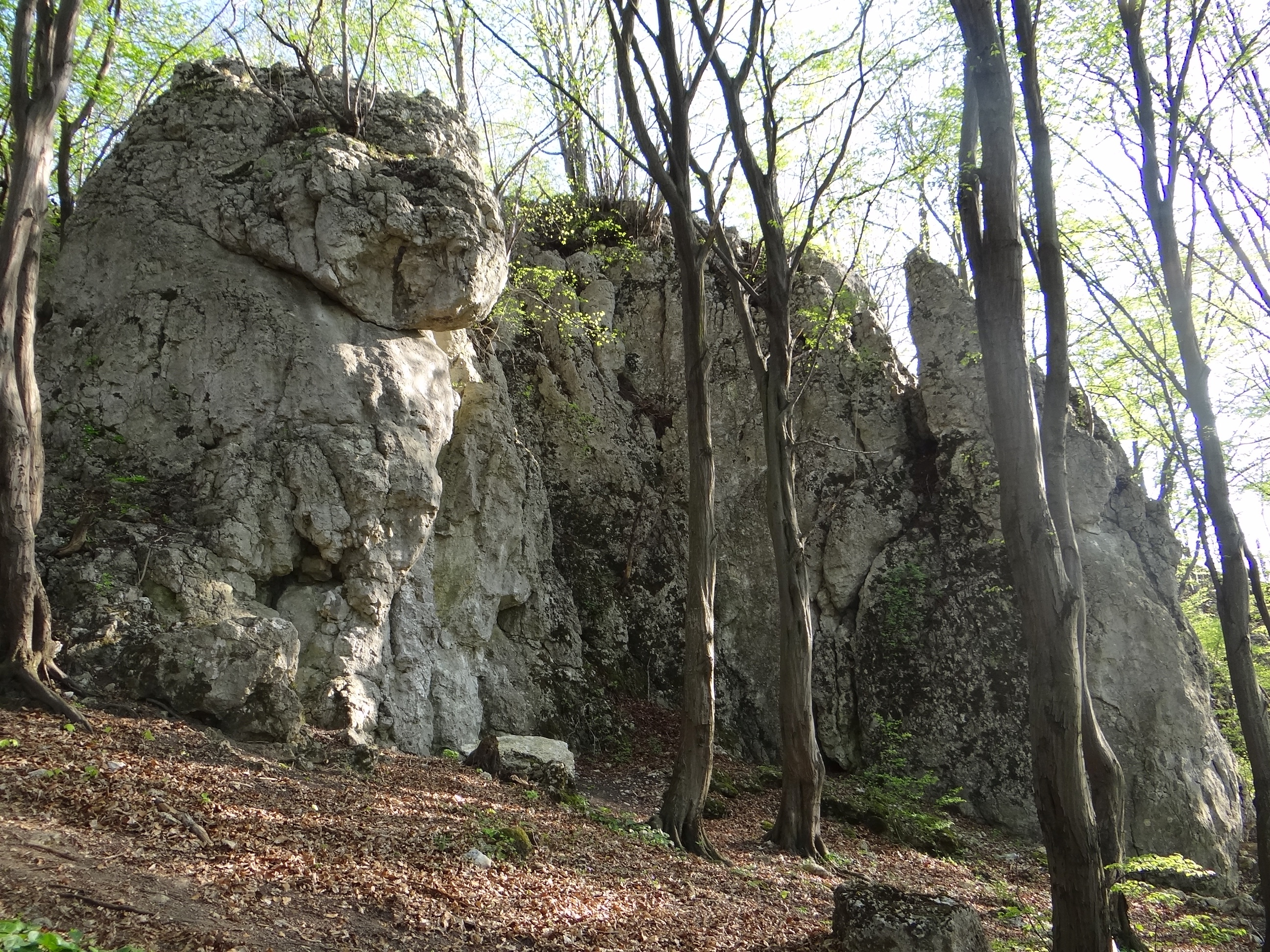 Skały Bulwa i Jenorożec w grupie skały Rogożowej w Przeginii